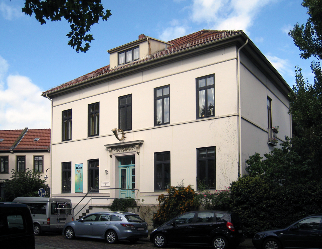 St. Remberti, Pastorenhaus in Bremen, Rembertiring 40.Das abgebildete Objekt ist ein geschütztes Kulturdenkmal in der Freien Hansestadt Bremen, mit der Nr. 1026 beim Landesamt für Denkmalpflege registriert.